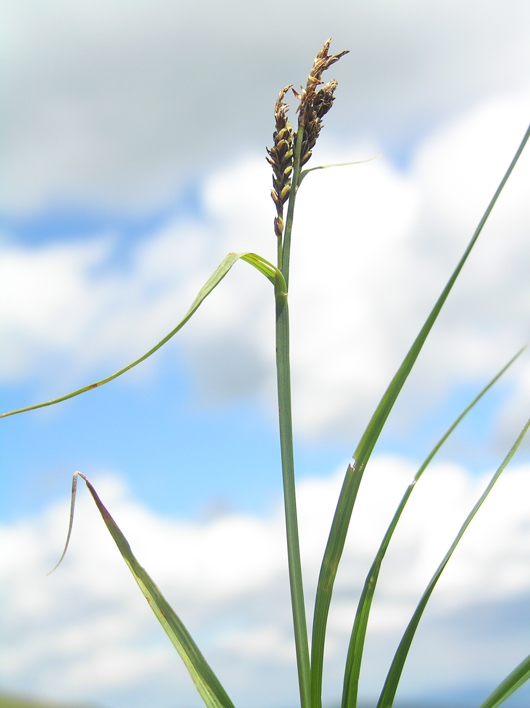 Carex bigelowii, Babia hora, Slovakia